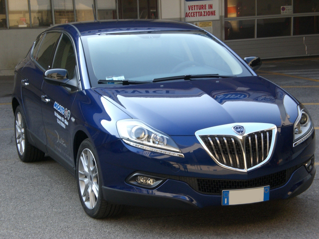 frontale della nuova lancia delta